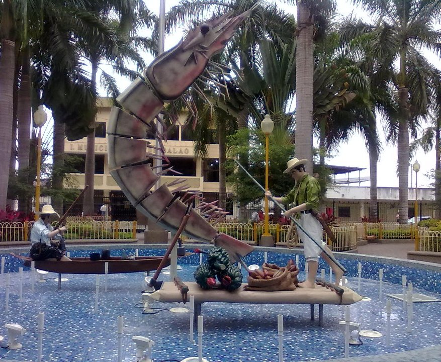 Escultura de la fuente. Ubicada en el parque central.